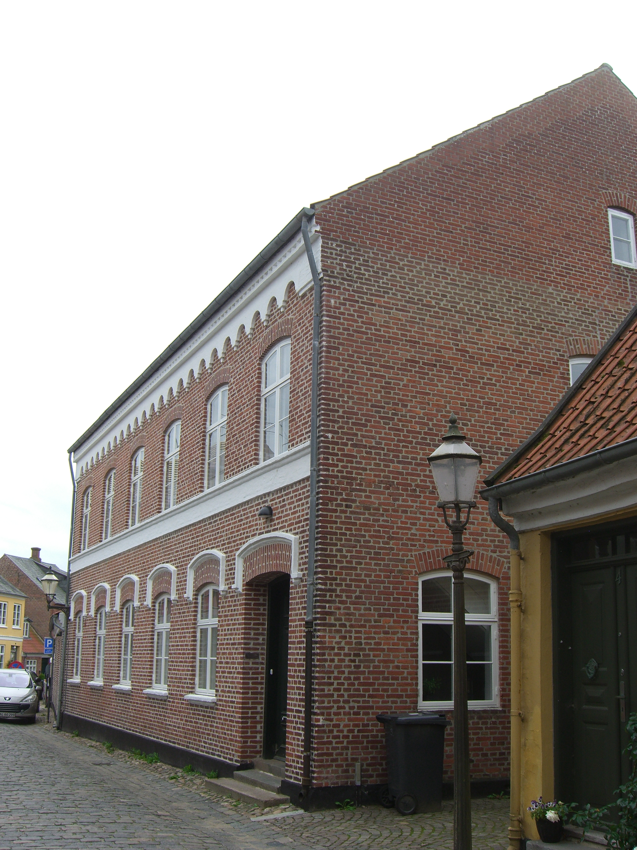 Sankt Catharinæ Præstegård, Ribe